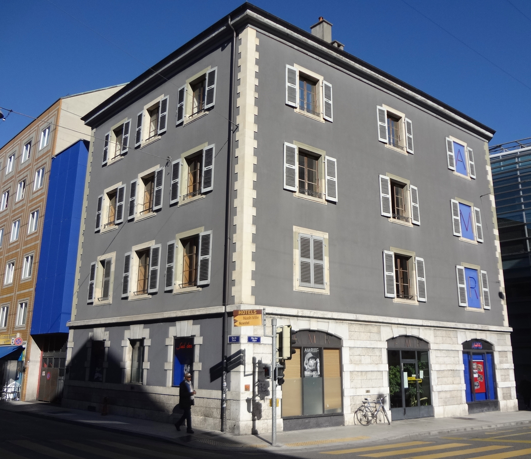 Bâtiment principal de l'AMR à Genève.